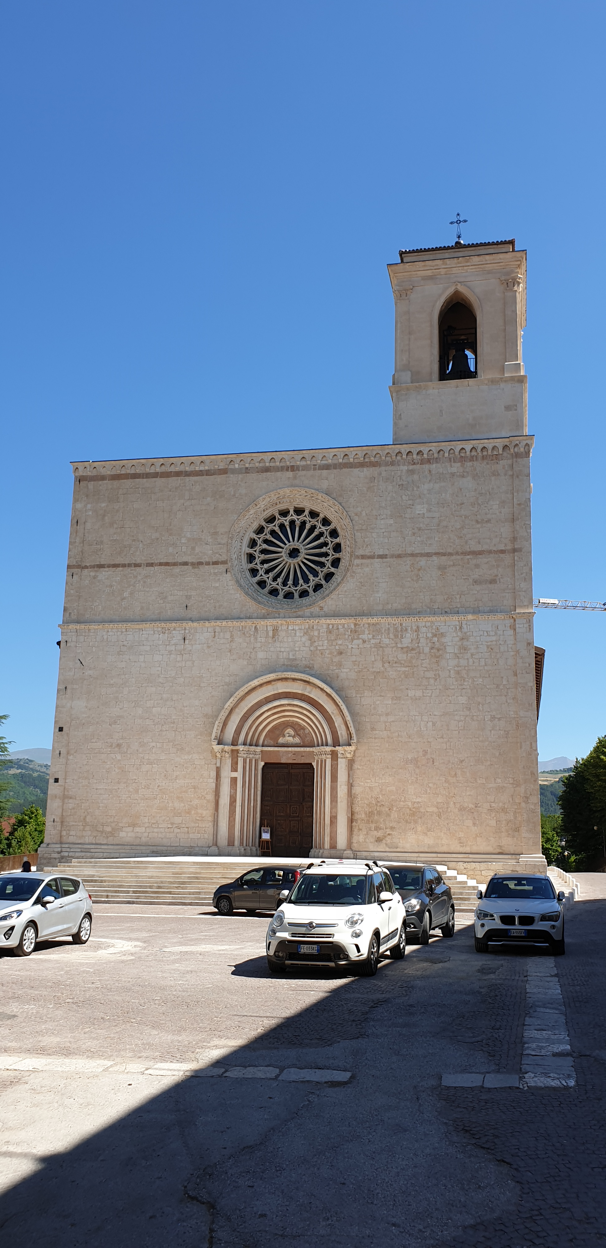 L'Aquila: Chiesa di San Silvestro